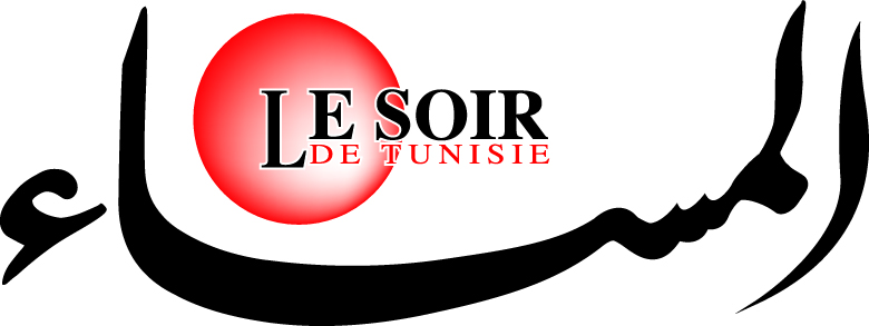 تصدر جريدة المساء كل يوم اربعاء في تونس